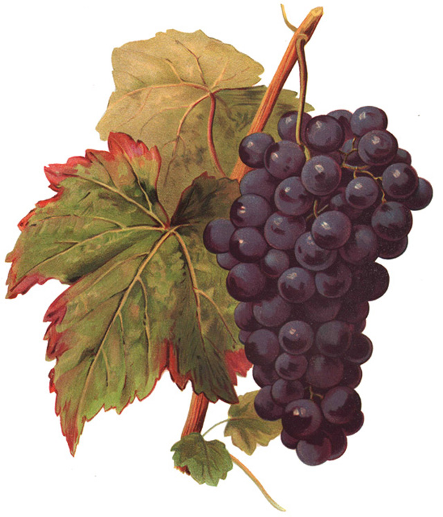 Grappe de Pinot Saint Laurent par Viala et Vermorel